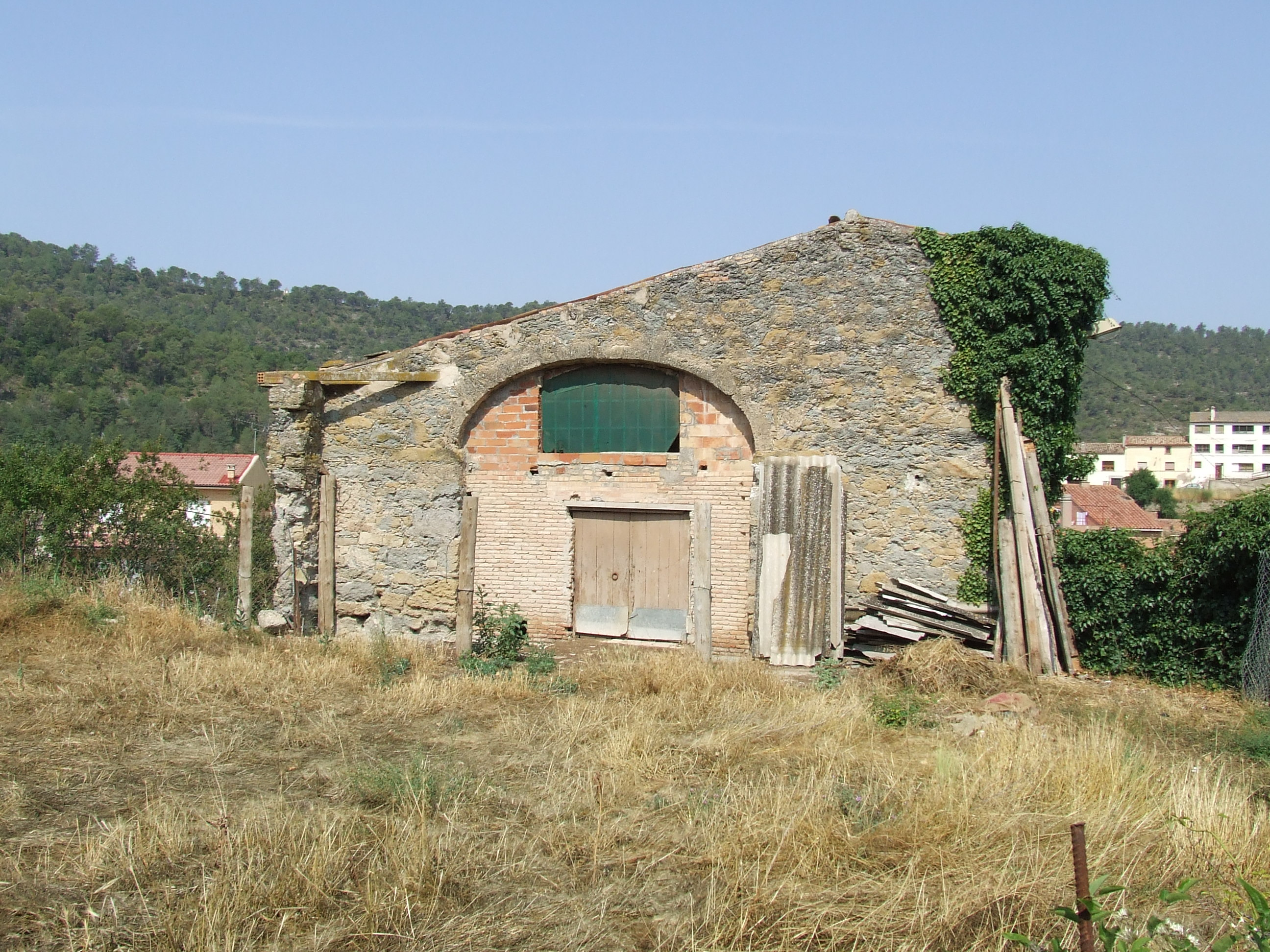 La Fassina del Solà (Monistrol de Calders, Moianès)